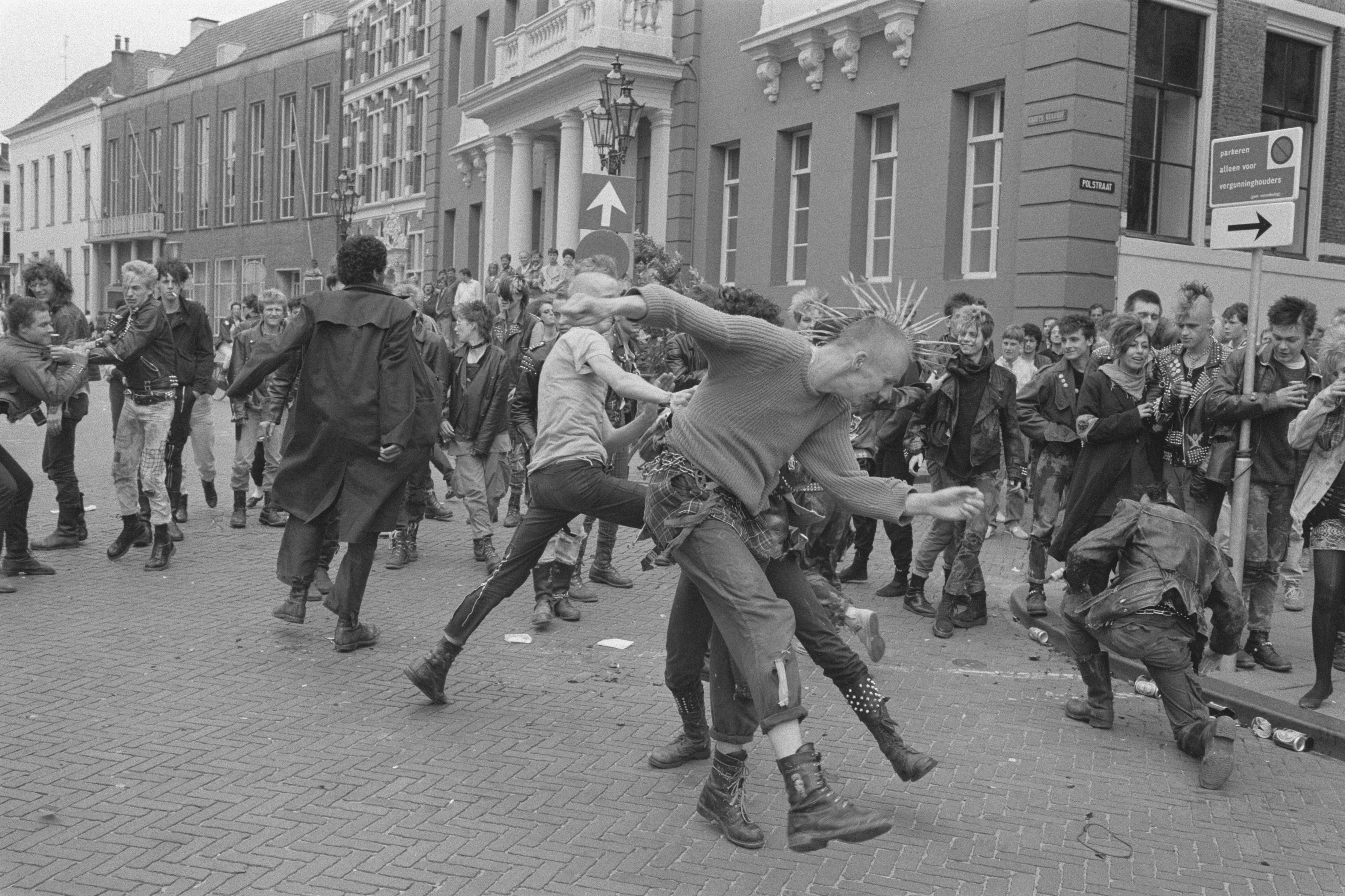 Collectie / Archief : Fotocollectie Anefo Reportage / Serie : [ onbekend ] Beschrijving : Doe wat festival in Deventer (festival van actiegroepen); groep punkers Datum : 22 juni 1984 Locatie : Deventer Trefwoorden : demonstraties, festivals, punkers Fotograaf : Antonisse, Marcel / Anefo Auteursrechthebbende : Nationaal Archief Materiaalsoort : Negatief (zwart/wit) Nummer archiefinventaris : bekijk toegang 2.24.01.05 Bestanddeelnummer : 933-0119